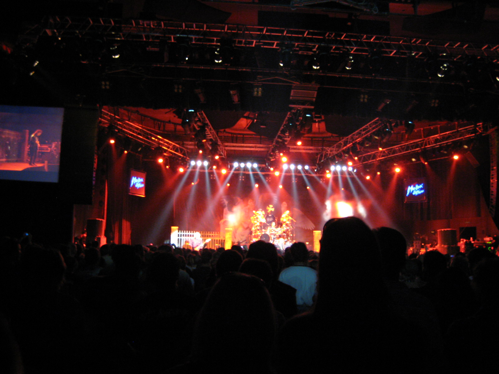 Montreux Jazz FestivalMontreux Jazz Festival